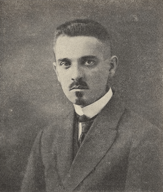 Feliks Hajduk. Dwudziestolecie wymarszu Legjonu Śląskiego w bój o niepodległość. Cieszyn: Nakładem własnym Komitetu Redakcyjnego, 1934.